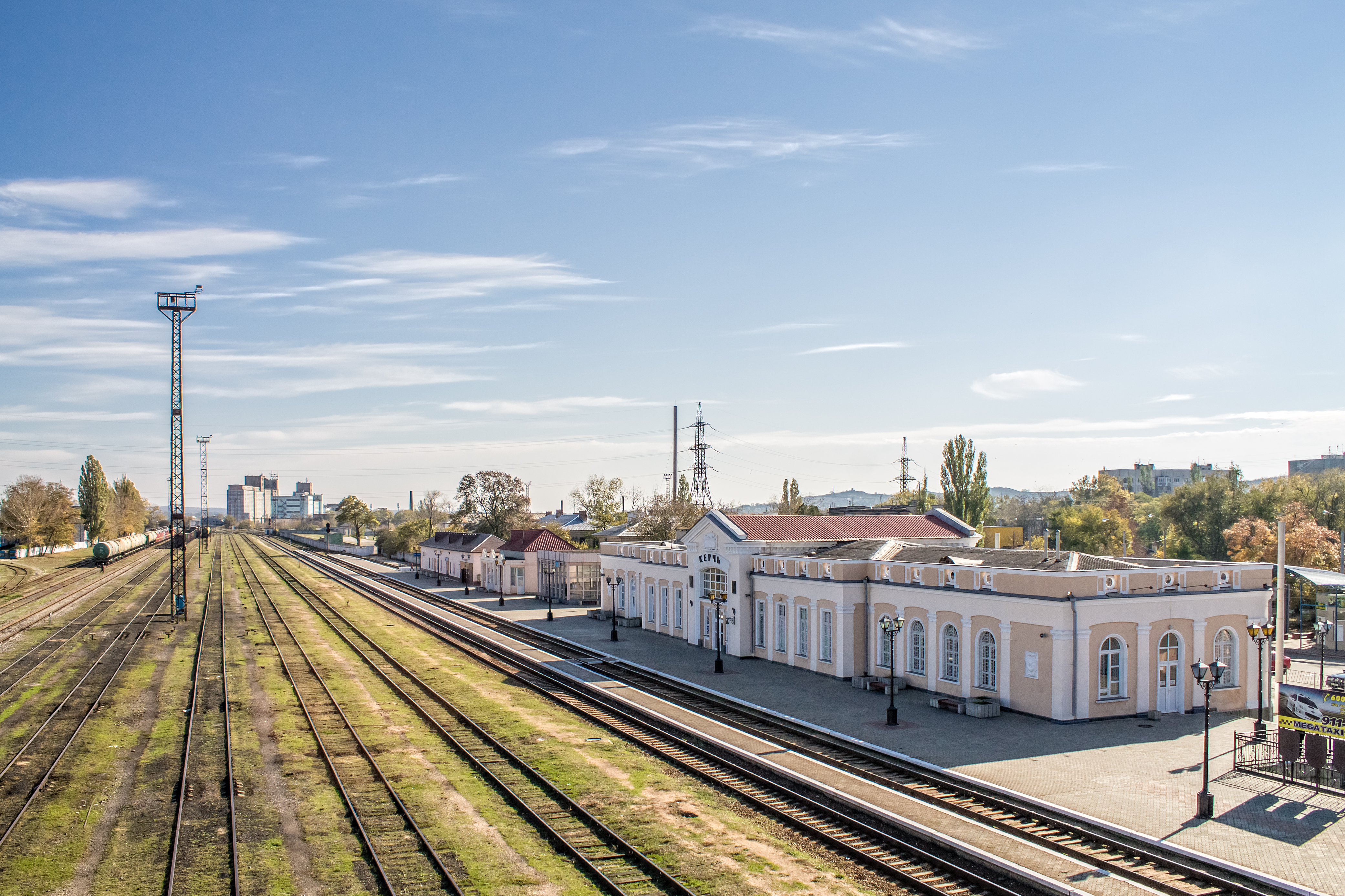 Станция Керчь см. фото 700688 в альбоме автора